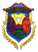 Escudo del municipio sonorense.